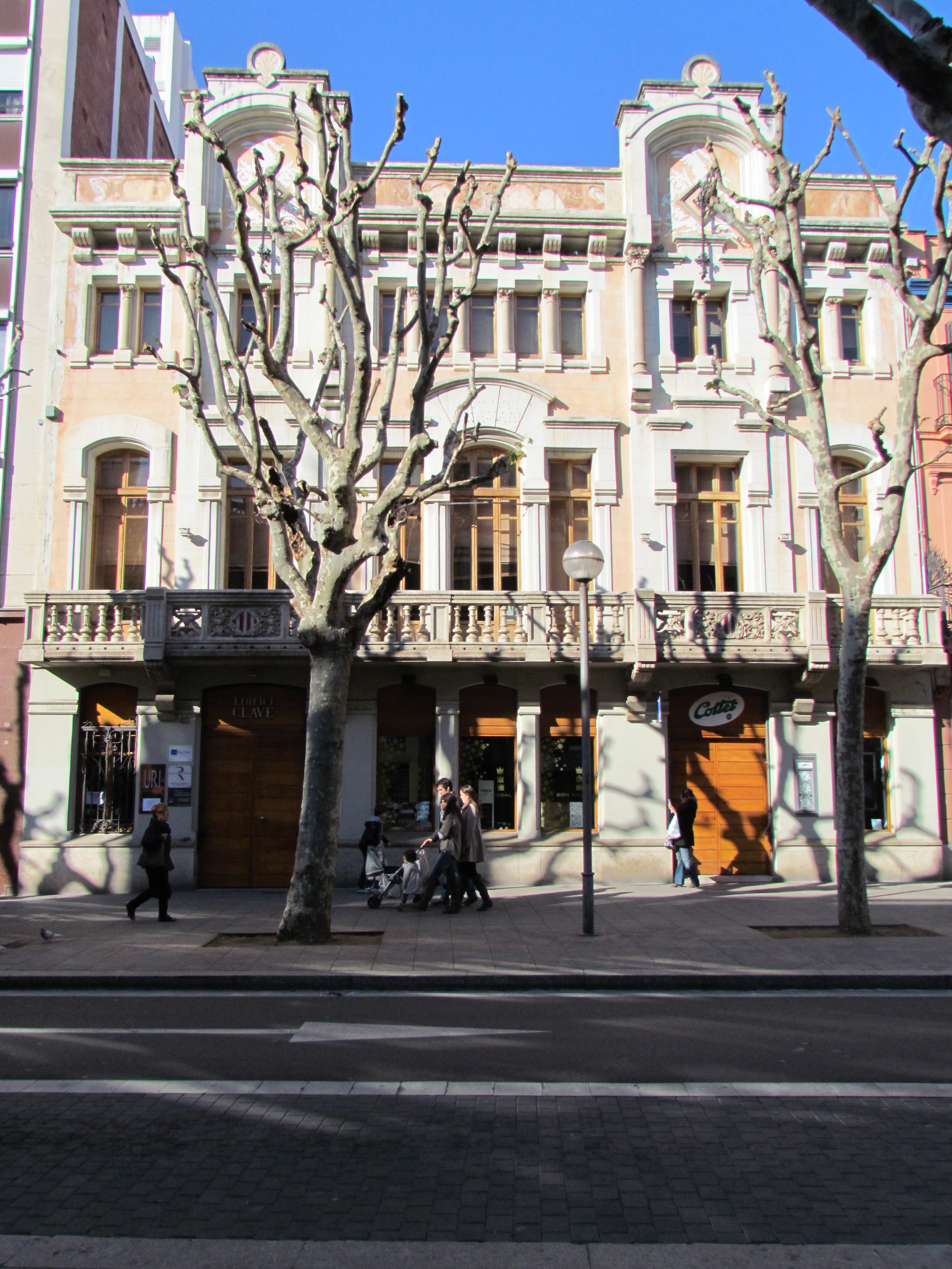 Vista de la Façana del Teatre Clavé. (Mataró, el Maresme)